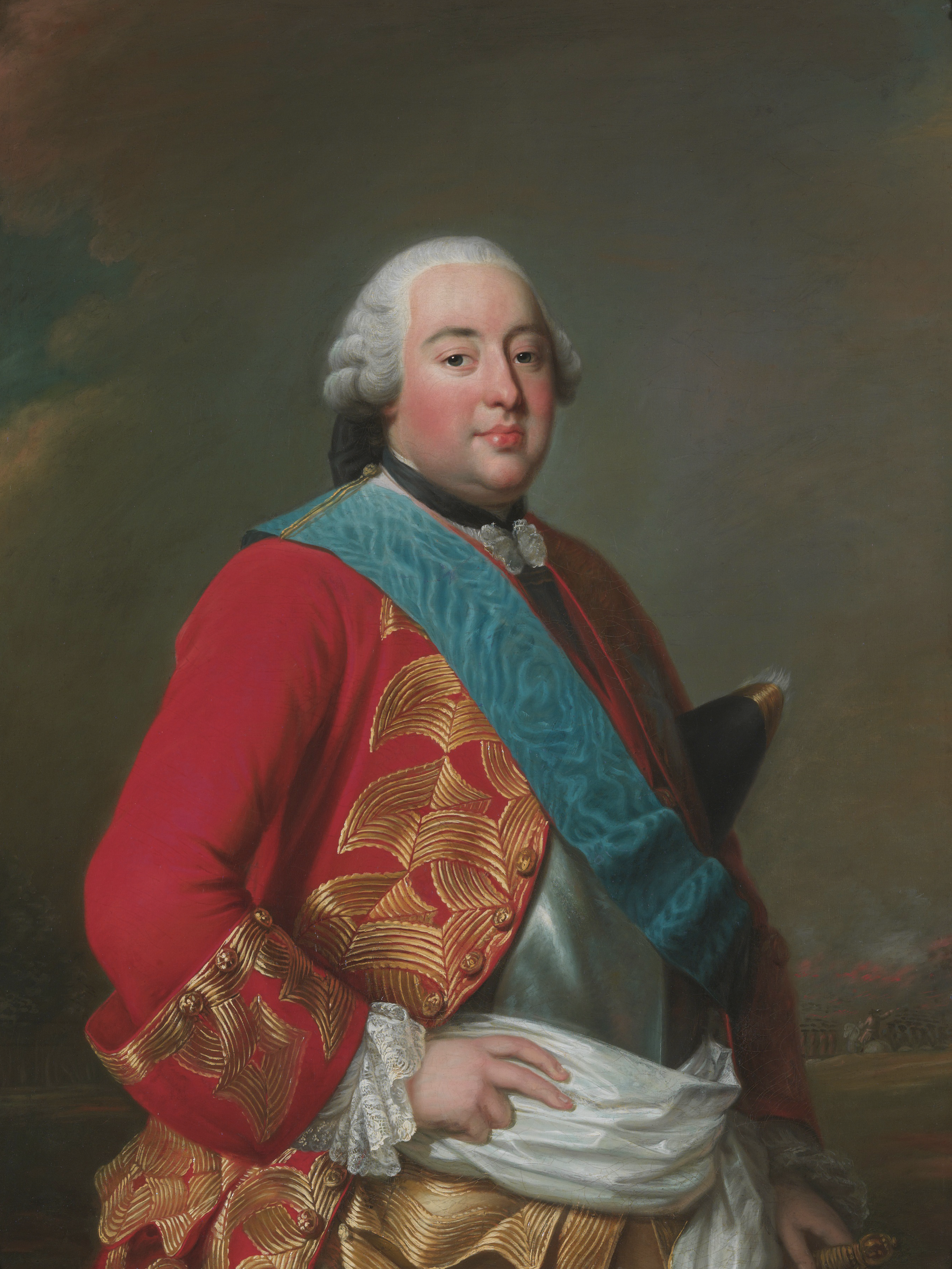 Louis Philippe d'Orléans (1725-1785) as Duke of Orléans